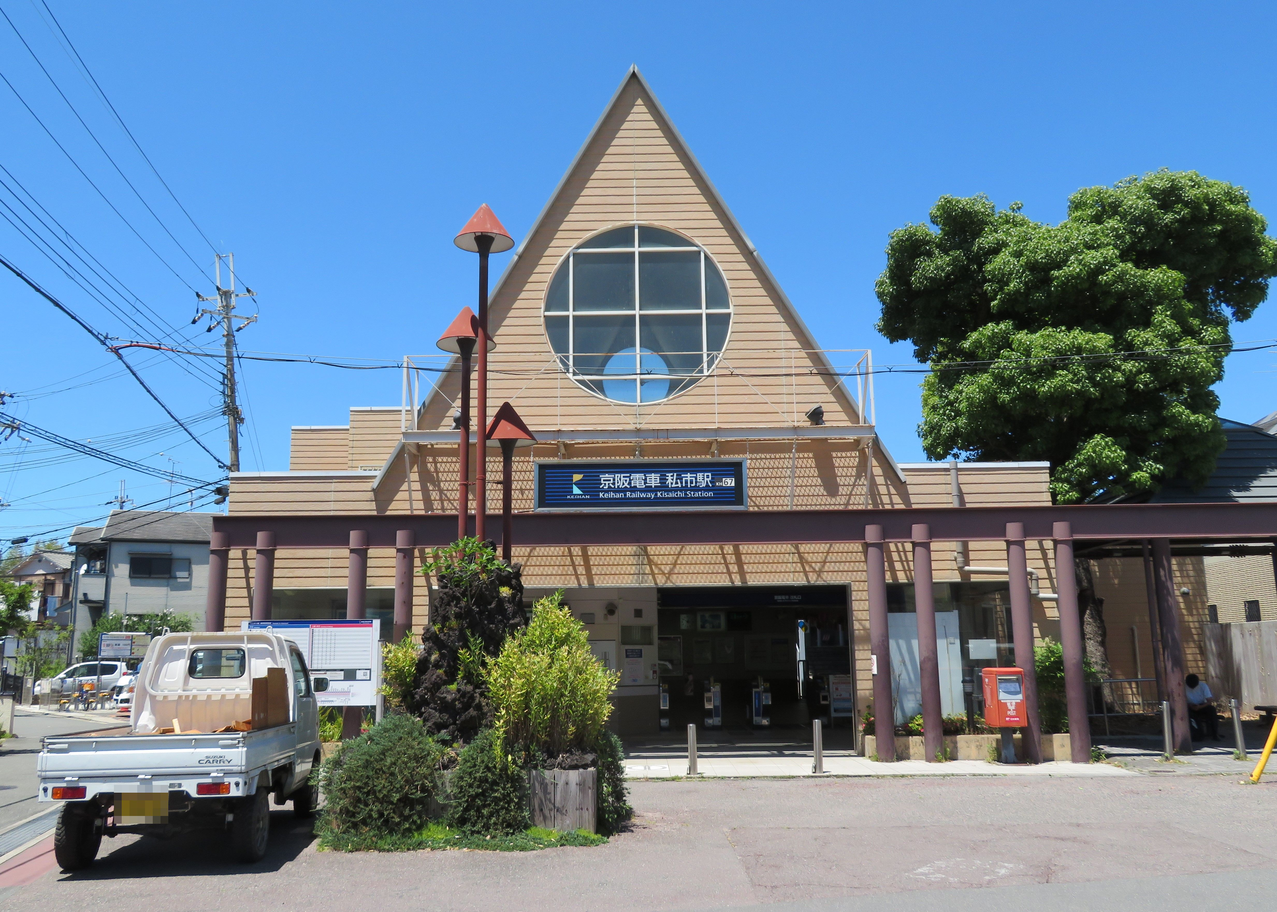 京阪電鉄私市駅